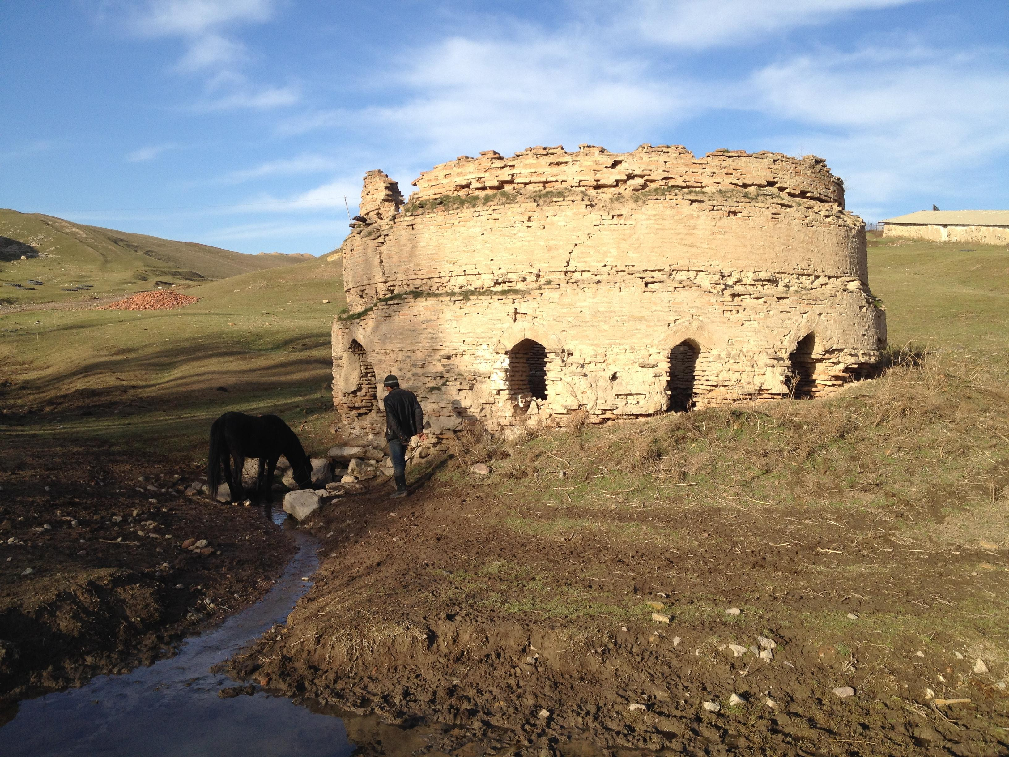 Сардоба Кайнар (родник Гумбаз) и вытекающий из него источник